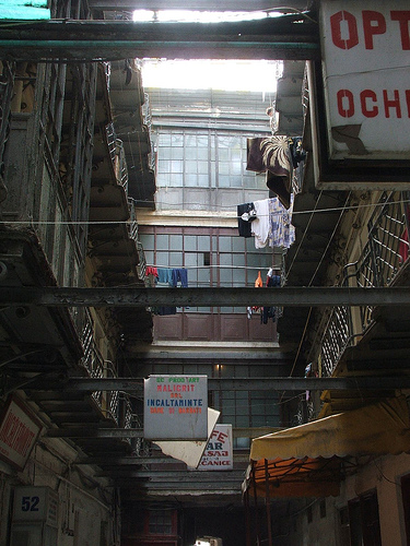 Fotografie a pasajului Englez din București Fotografie de Miruna Stroe